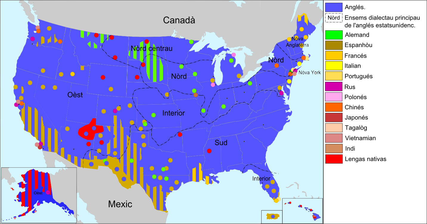 Esquèma generau dei lengas parladas sus lo territòri estatsunidenc.